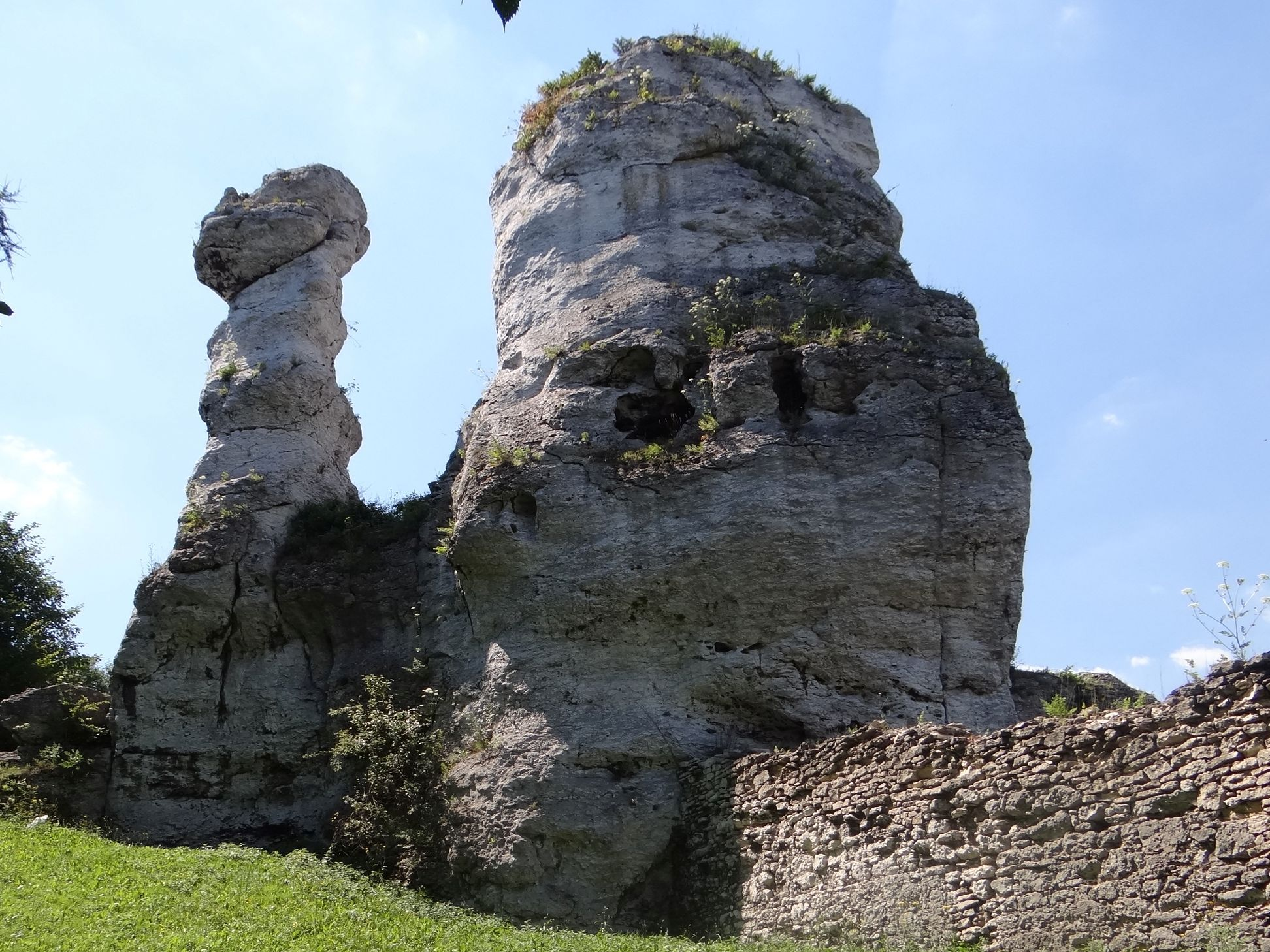 Skały Lalka i Sfinks na Zamku Ogrodzieniec